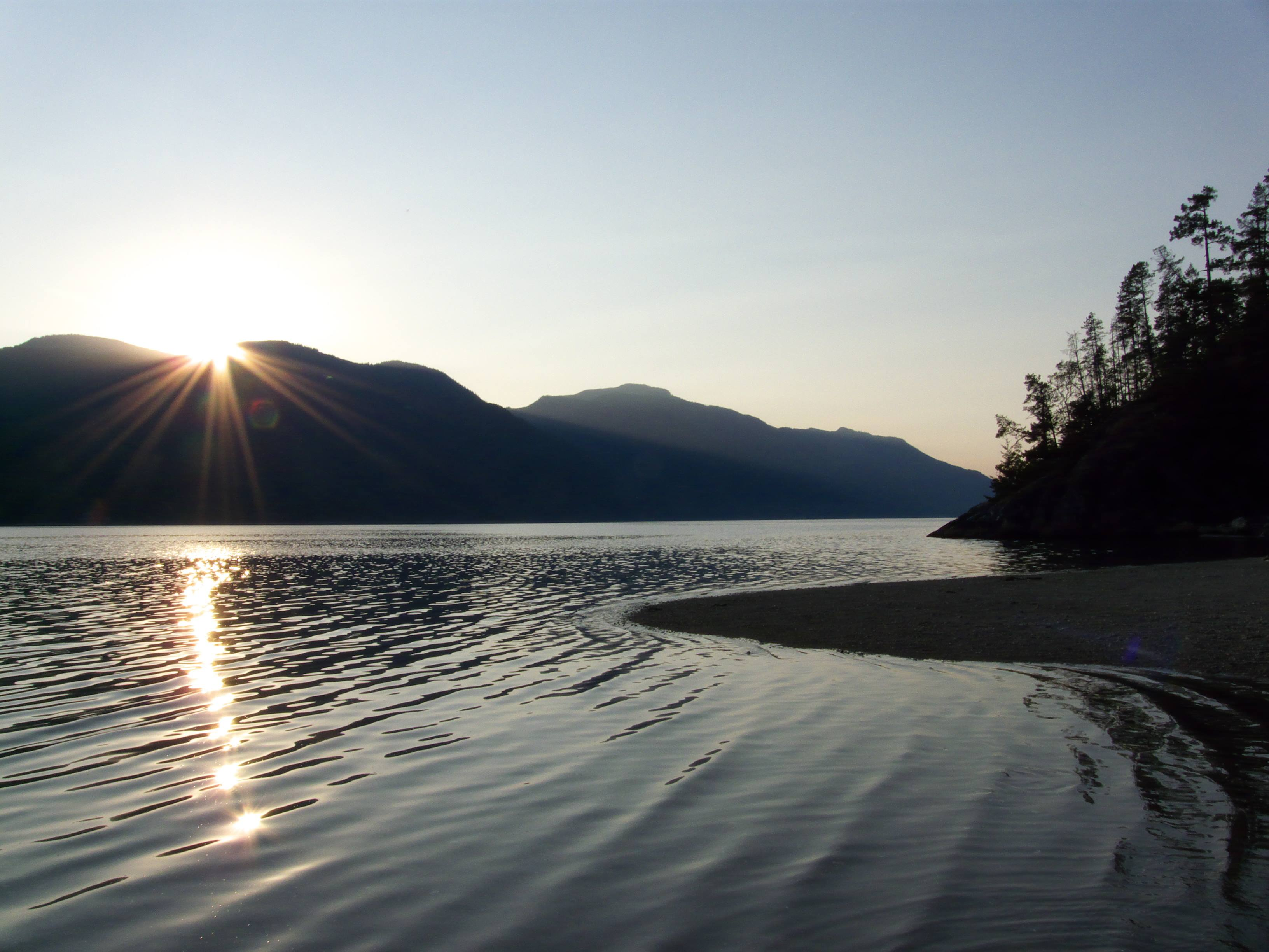 Nine Mile Point Marine Park